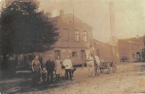 2. Dieses Foto aus dem Jahre 1926 zeigt die Abendanlieferung eines Bauern, die Familie des Molkereiverwalters und den damaligen Lehrling.